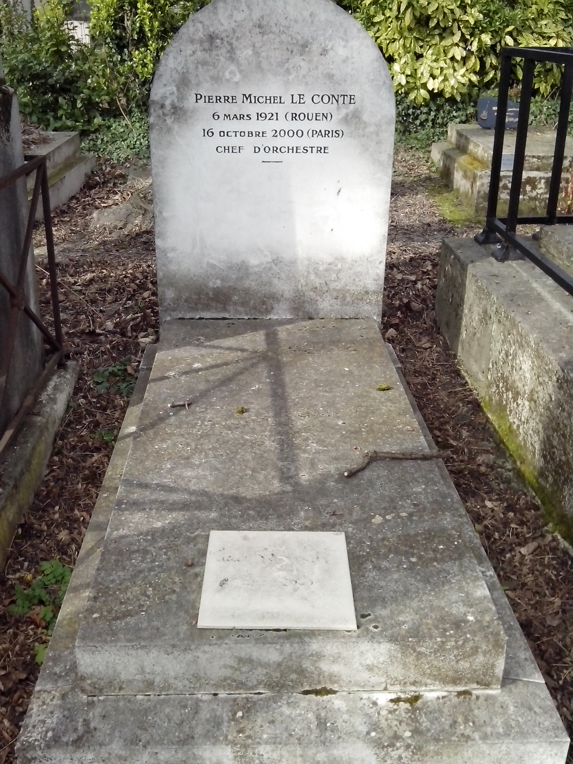 Vue d'ensemble